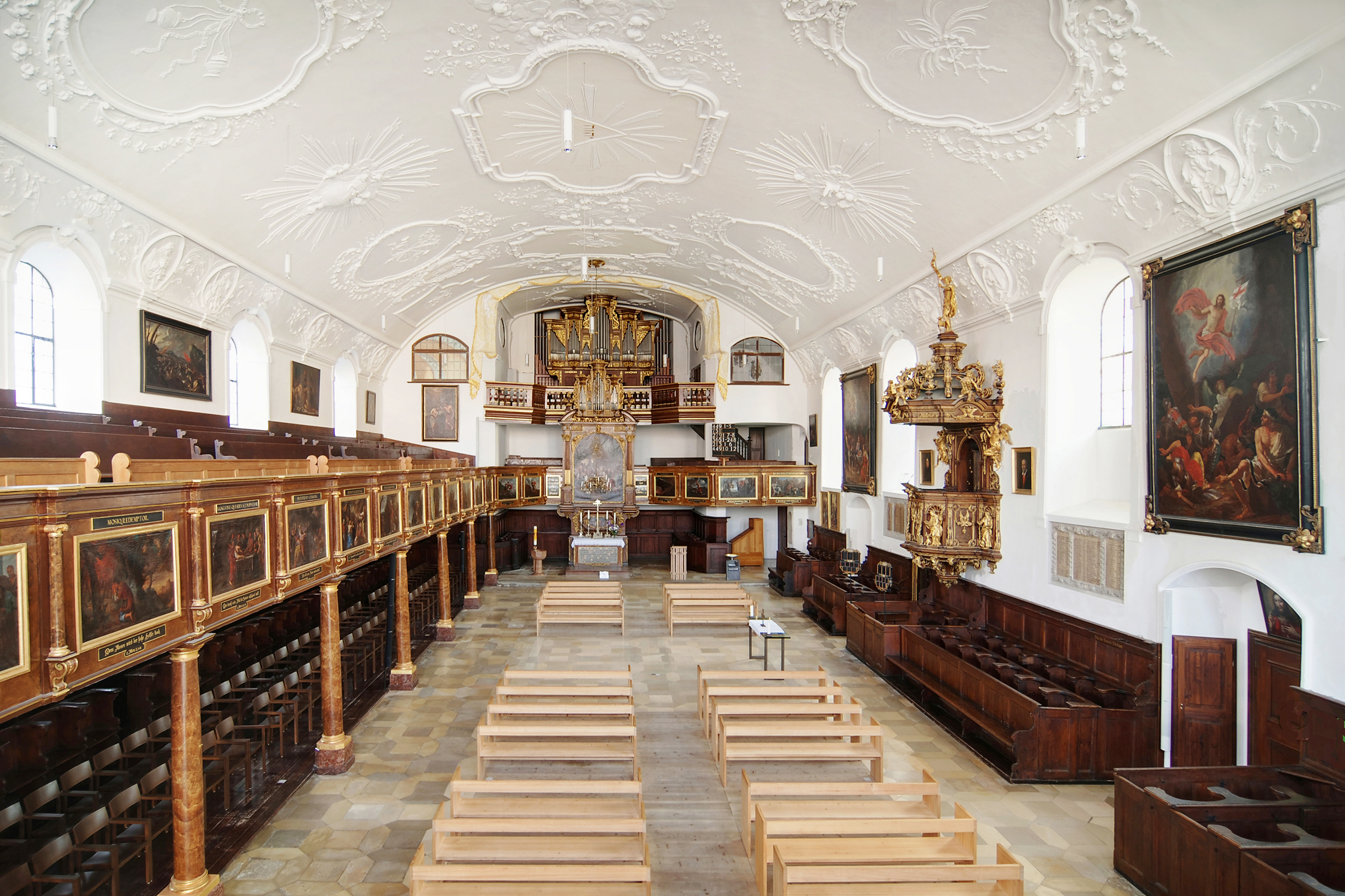 Die evangelische Ulrichskirche in Augsburg wr ursprünglich eine Vorhalle des Klosters und diente Wallfahrern als Kaufhalle. Die Vorhalle wurde auch Ulrichgred genannt. 1457 wurde die Vorhalle zur Kirche umgebaut.